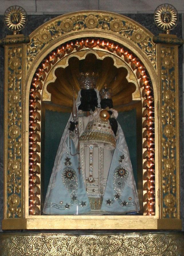 Gnadenbild in der Marienkapelle in Wegberg-Holtum